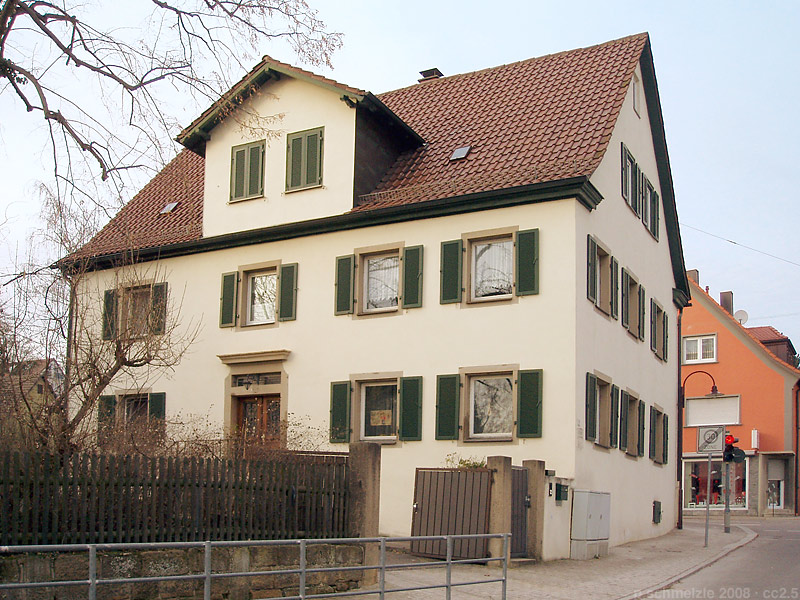 Evang. Pfarrhaus aus dem 18. Jhd. in der Kirchbergstraße 2 in Heilbronn-Neckargartach